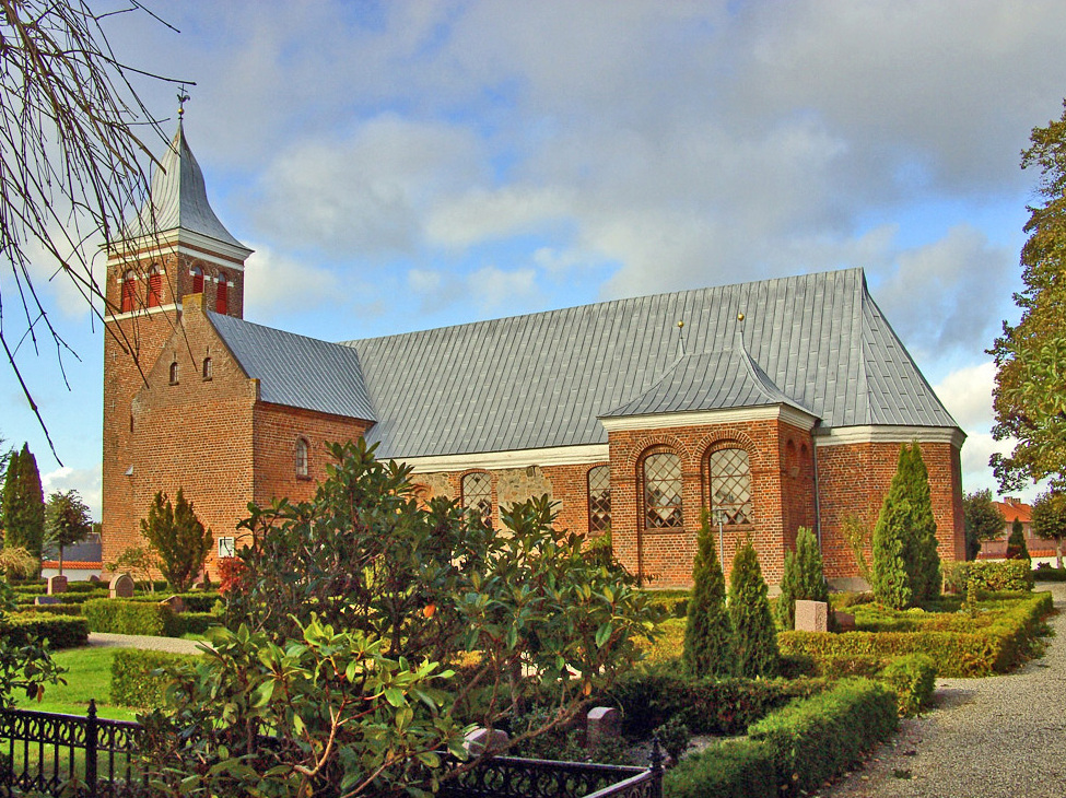 fra sydøst